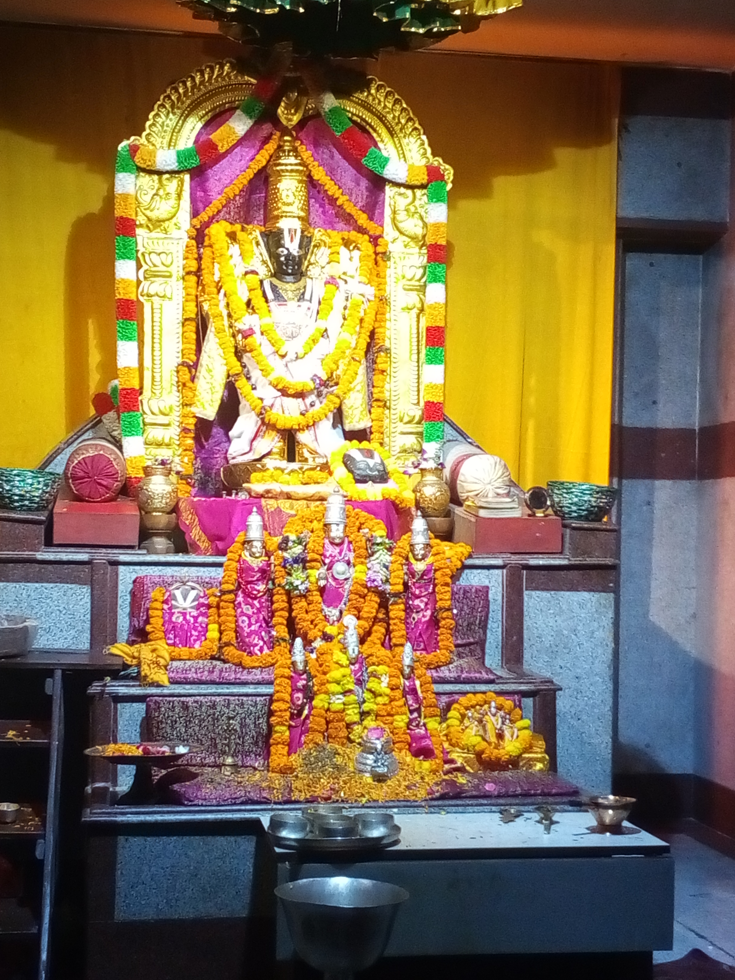 नेपाली: वेंकटेश मन्दिर काठमाण्डु